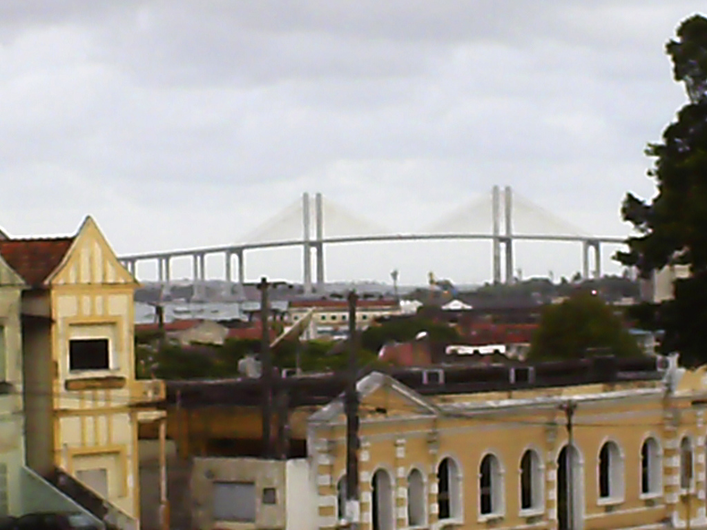 Capitania das Artes e Ponte Forte Redinha. Natal/Brasil.